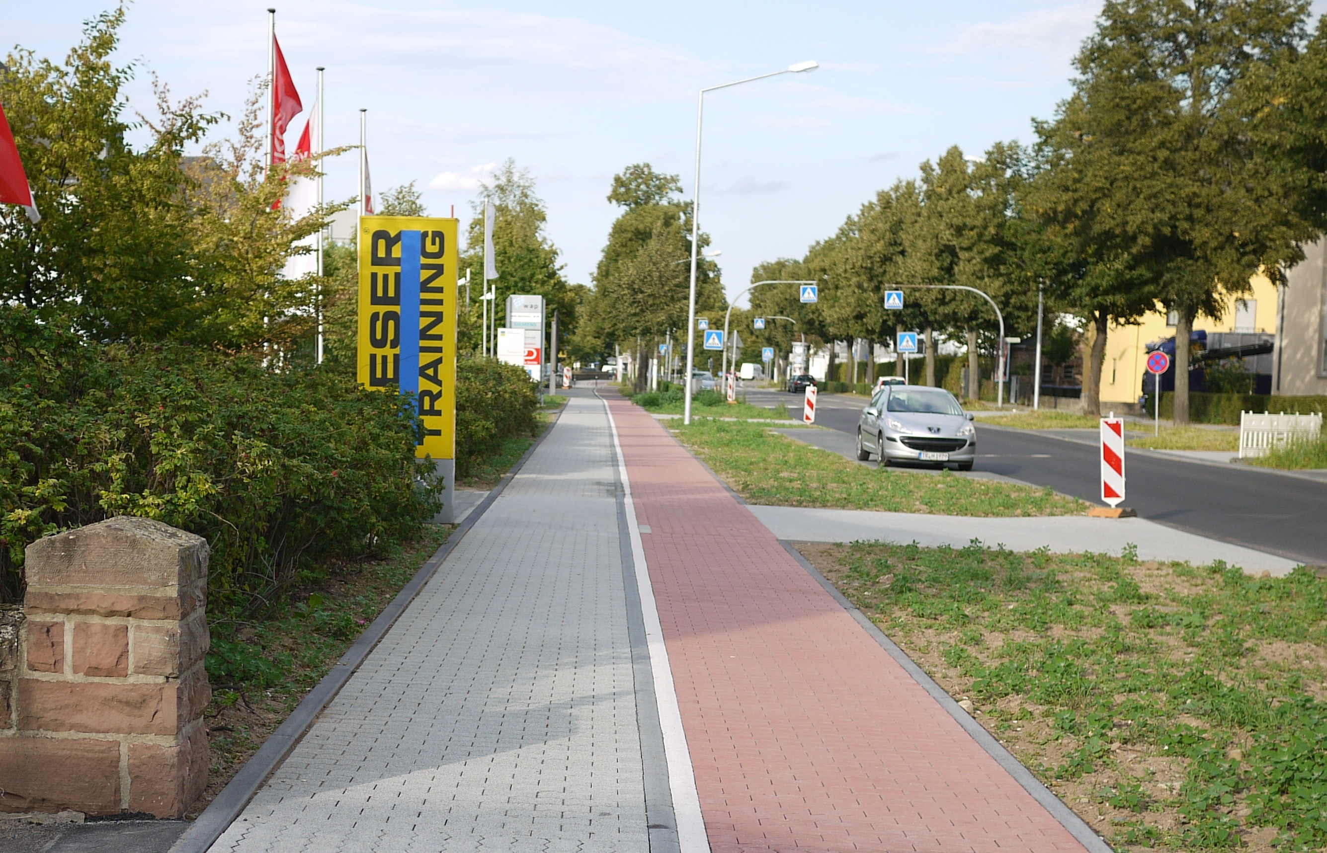 Тротуар с велодорожкой